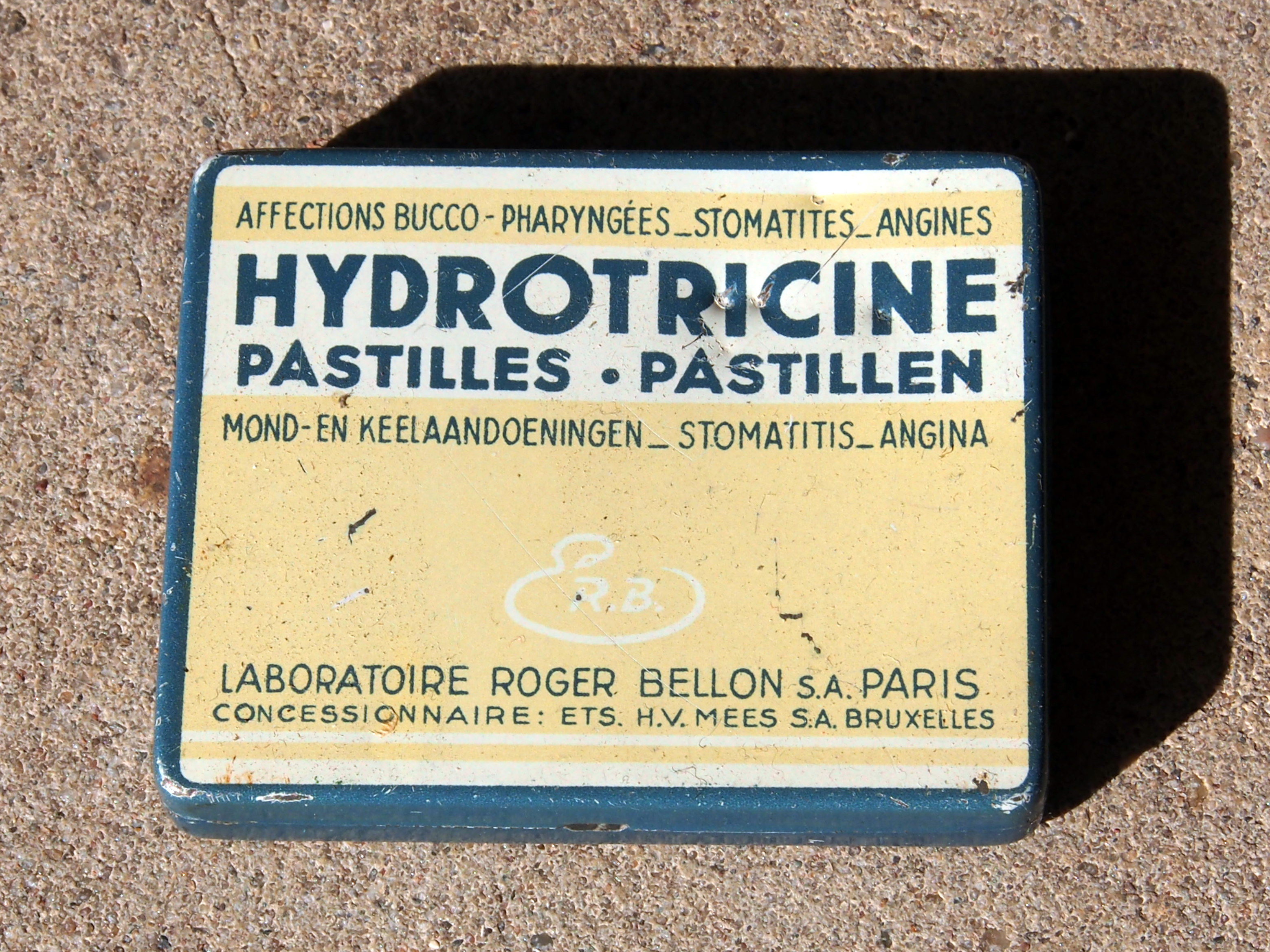 Hydrotricine pastilles.